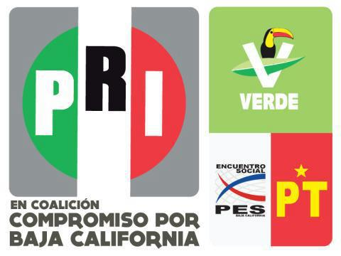 Logotipo de la Coalición "Compromiso por Baja California", que compitiera en las Elecciones Estatales de Baja California de 2013. Integrada por el PRI, el PVEM, el PES y el PT